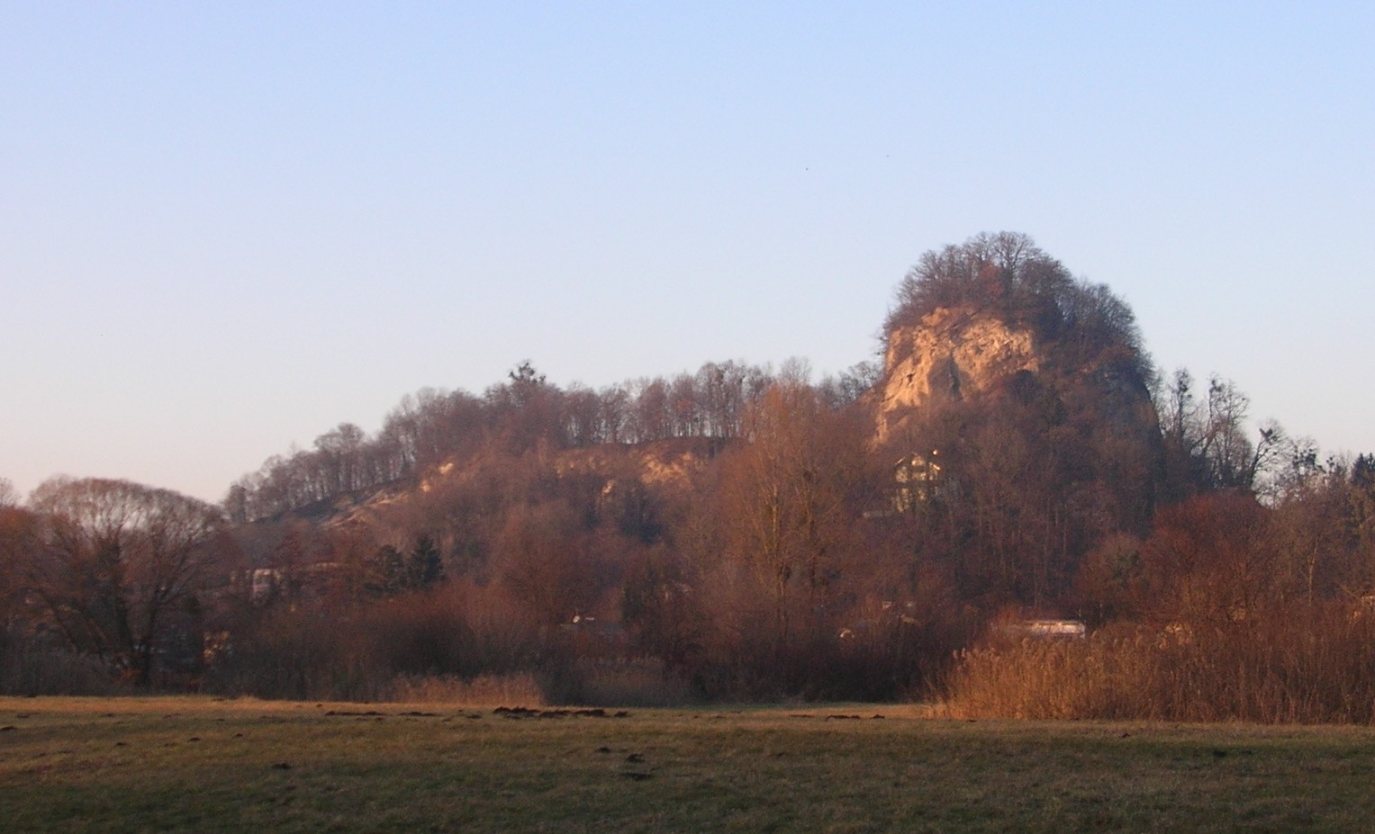 Rainberg, Salzburg, Österreich von Südosten